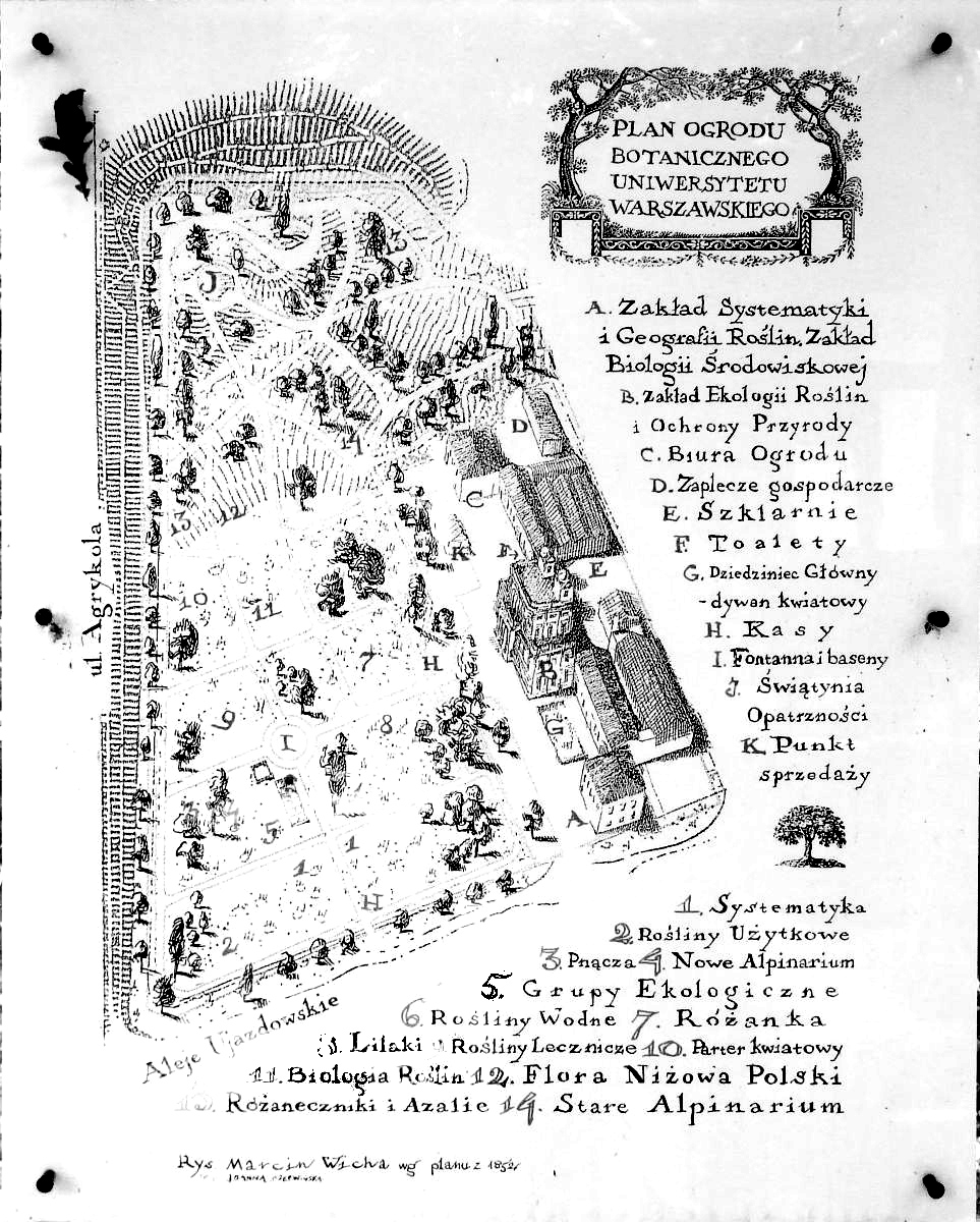 Plan, Ogród Botaniczny UW w Warszawie